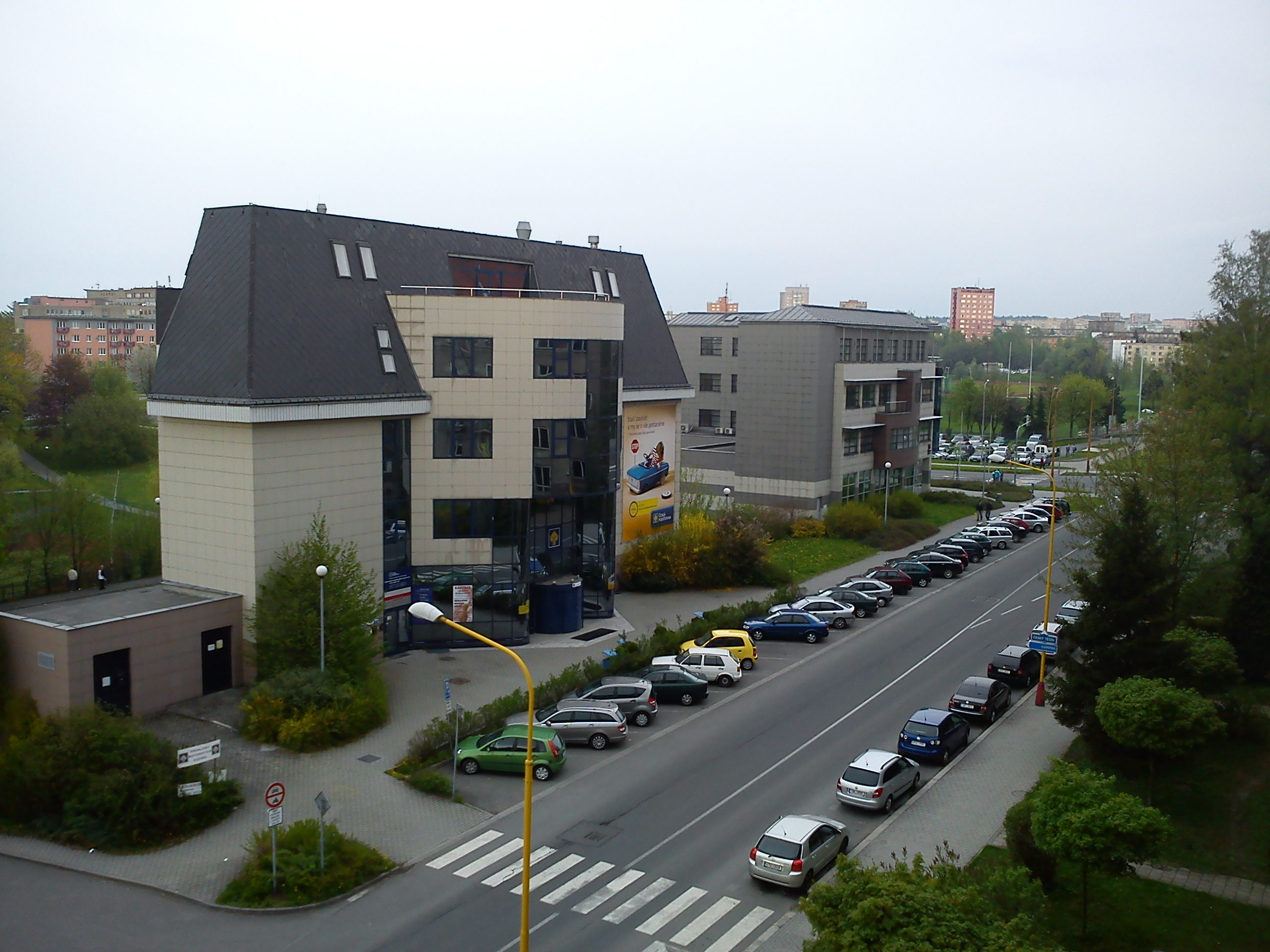 Příklad novější nebytové zástavby v Havířově